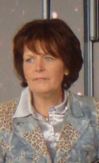 Brigitte Le Brethon en meeting.